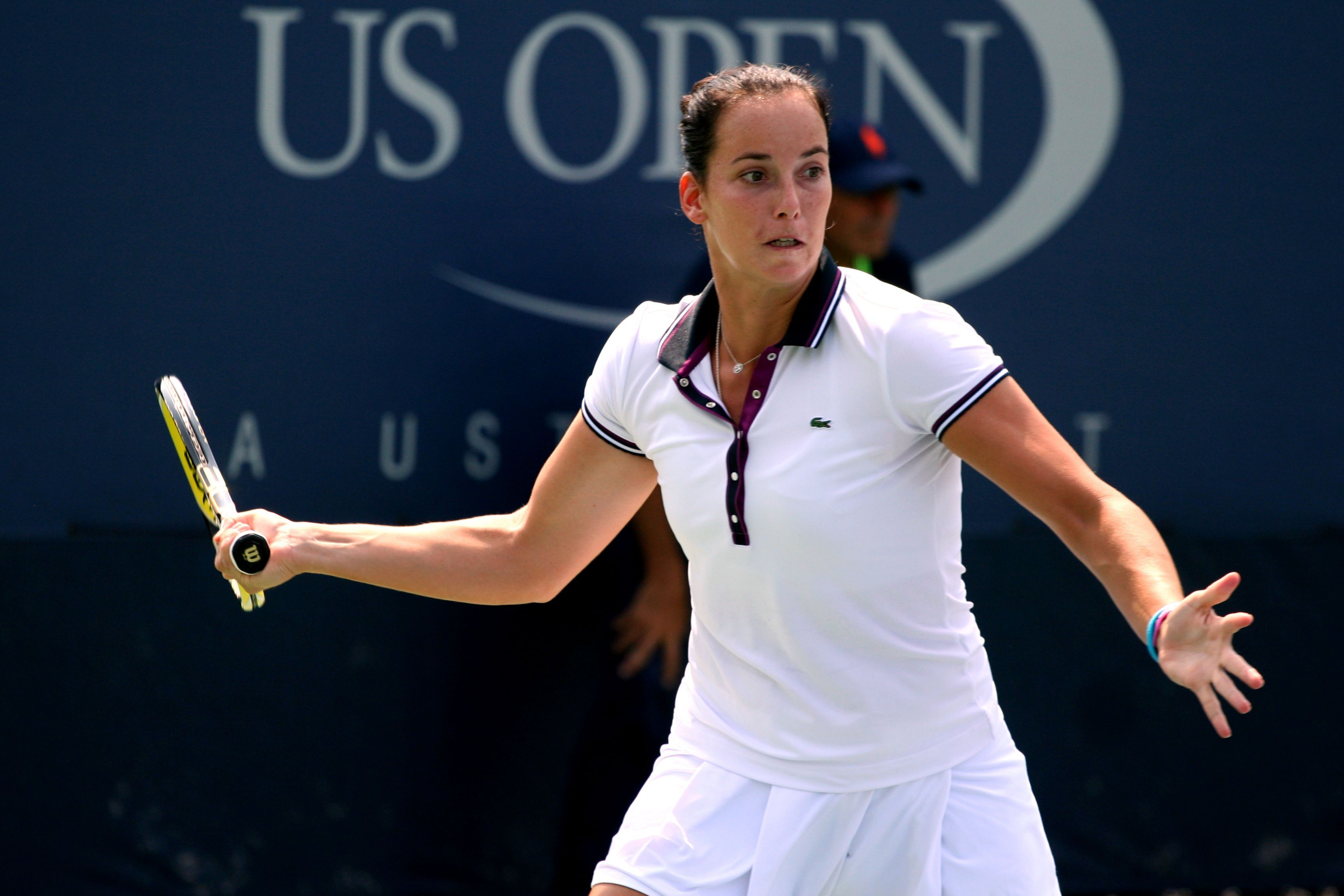 U.S. Open Saturday, Sept. 3, 2011